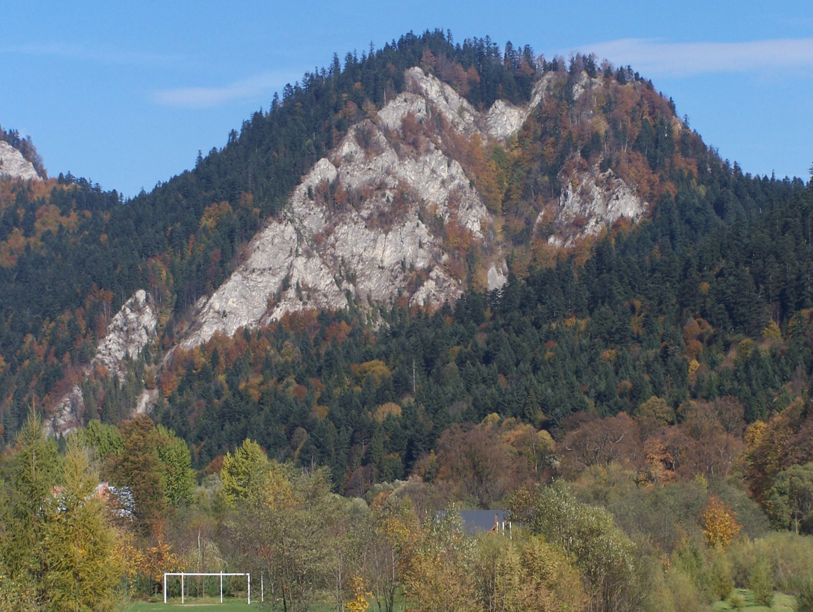 Facimiech (Pieniny)